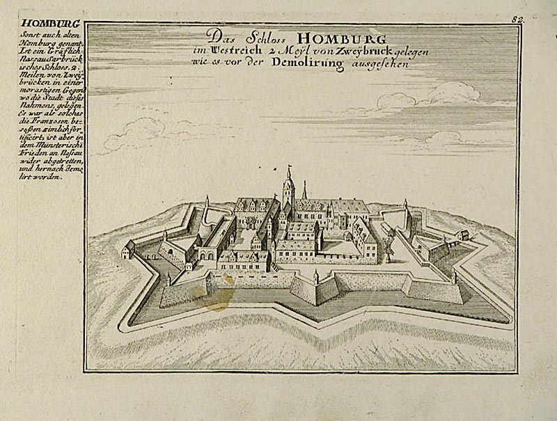 „Das Schloss Homburg im Westreich 2 Meÿl von Zweÿbruck gelegen wie es vor der Demolierung ausgesehen.“Copperplate print, 15 x 22 cm